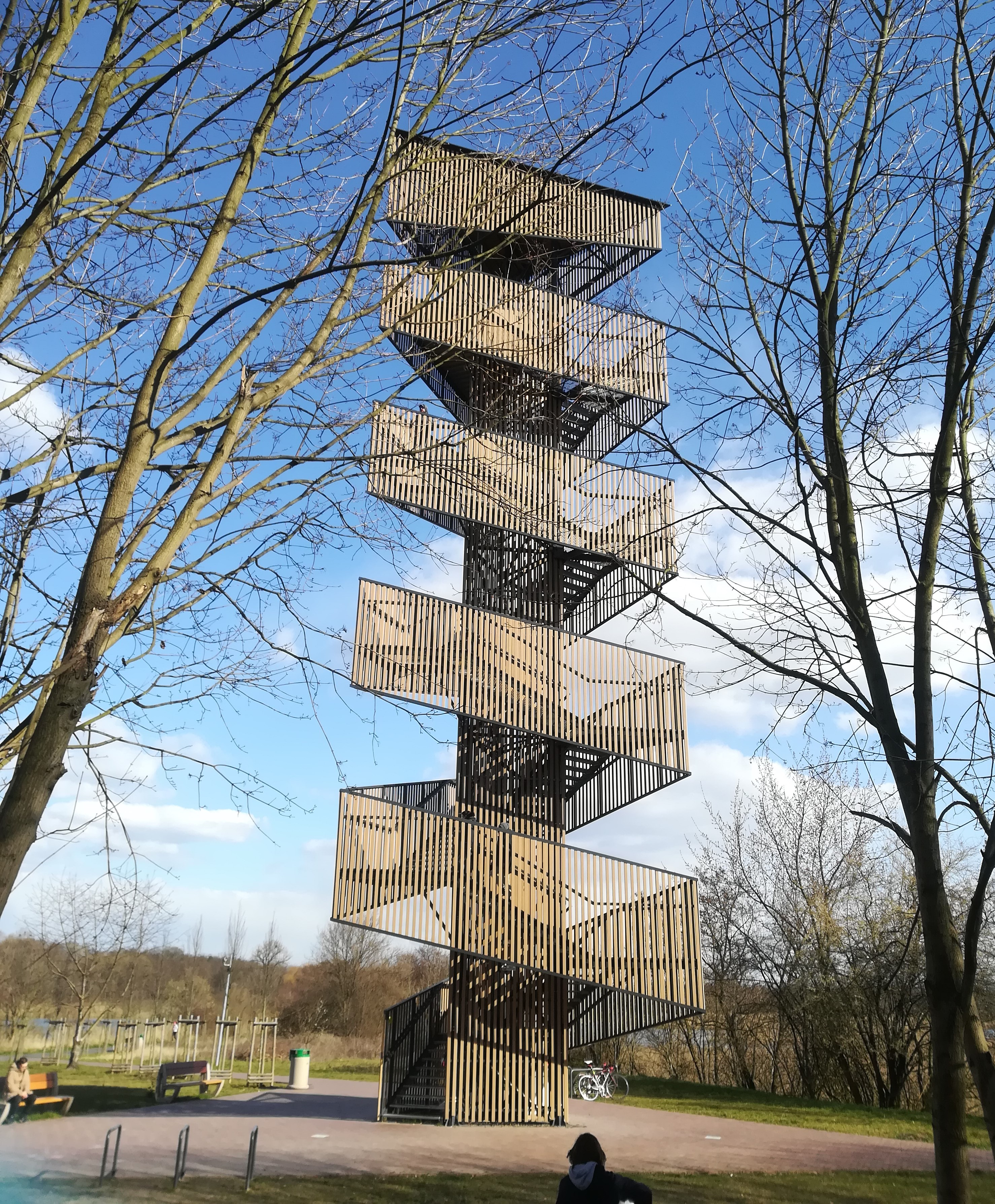 Wieża widokowa na Szachtach w Poznaniu.